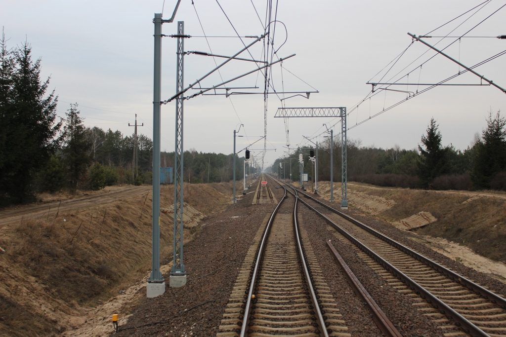 Posterunek odgałęźny Pilica